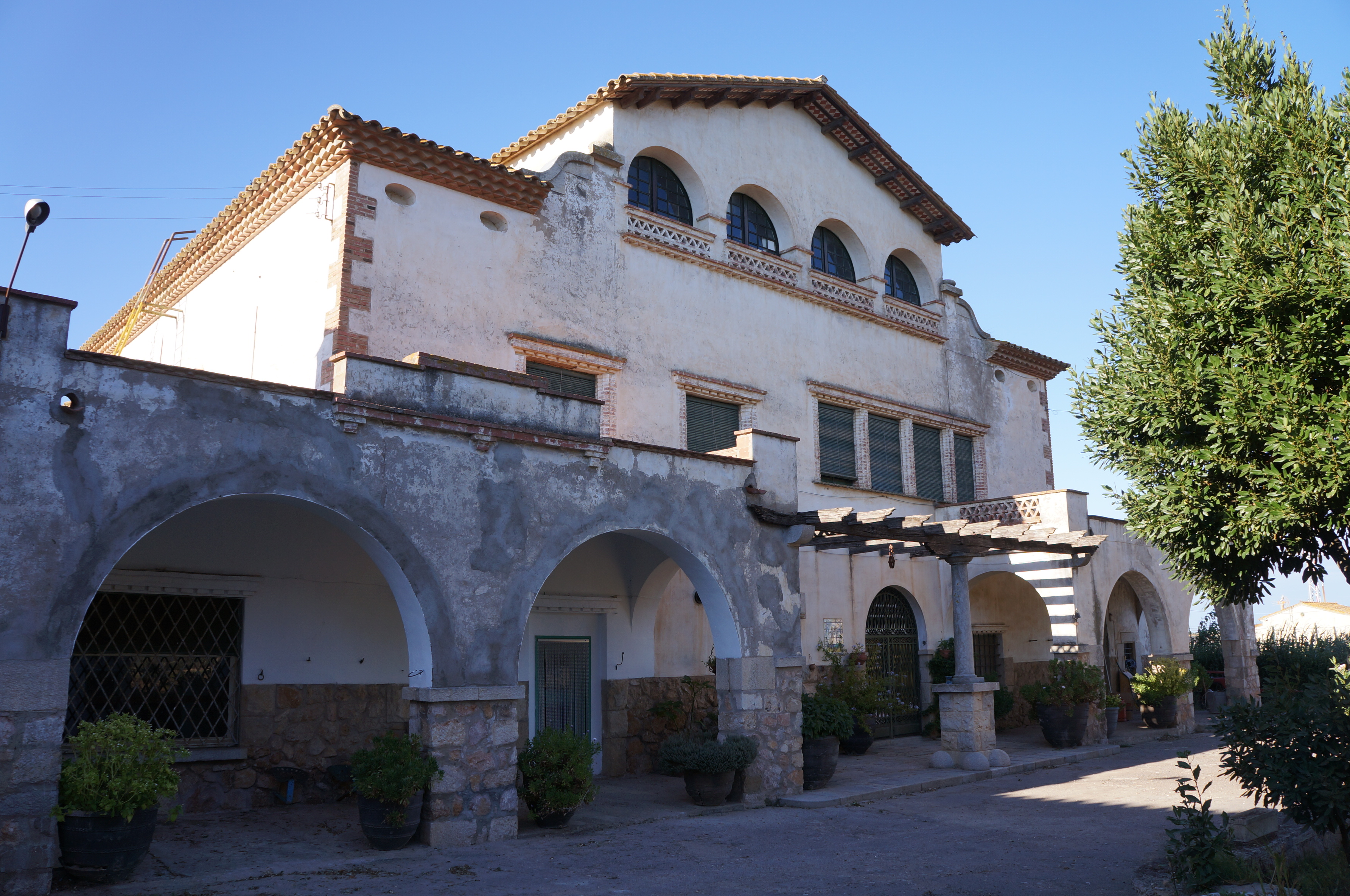 Casa Jaume Massaguer